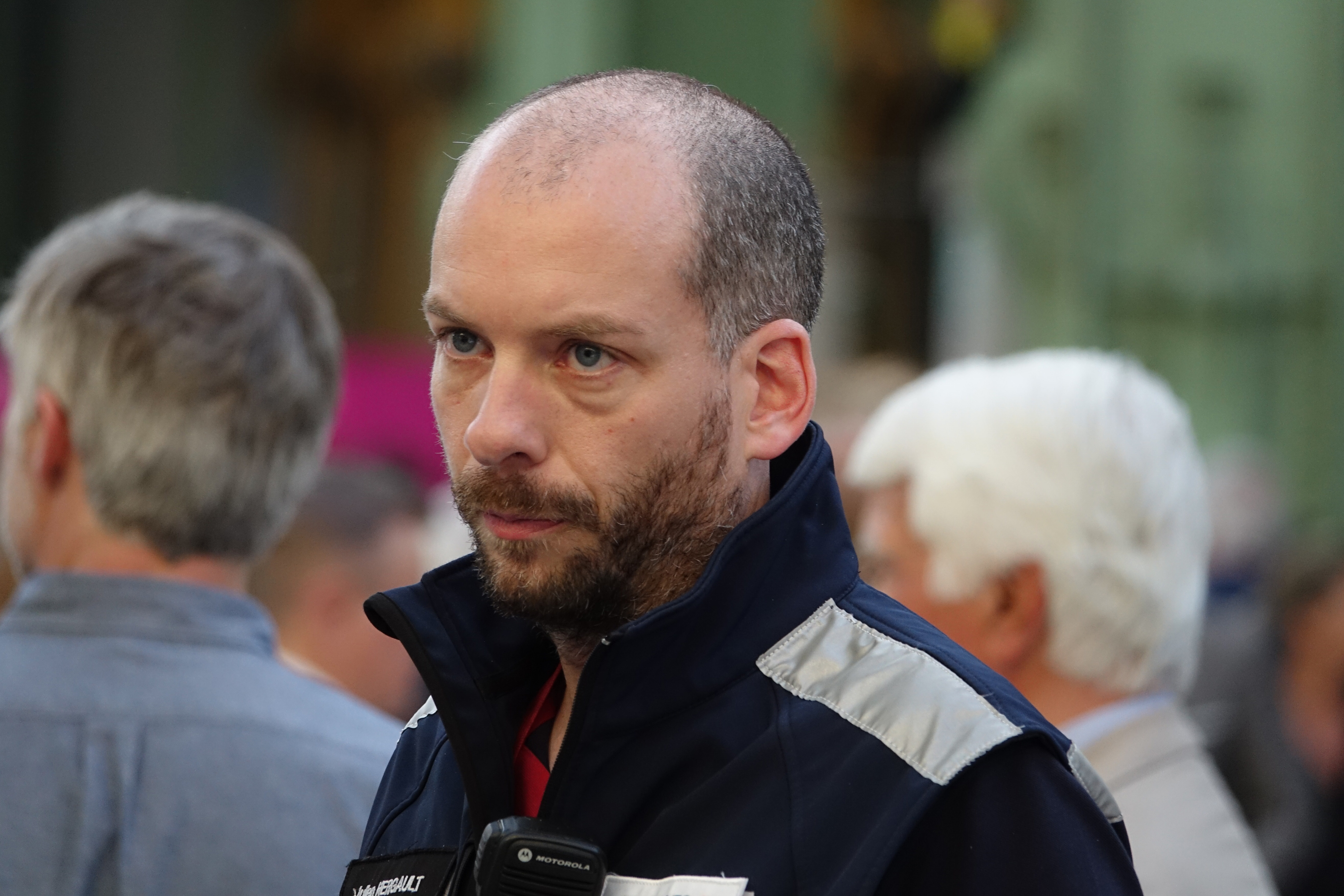 Julien Hergault au Tour Auto Optic 2000